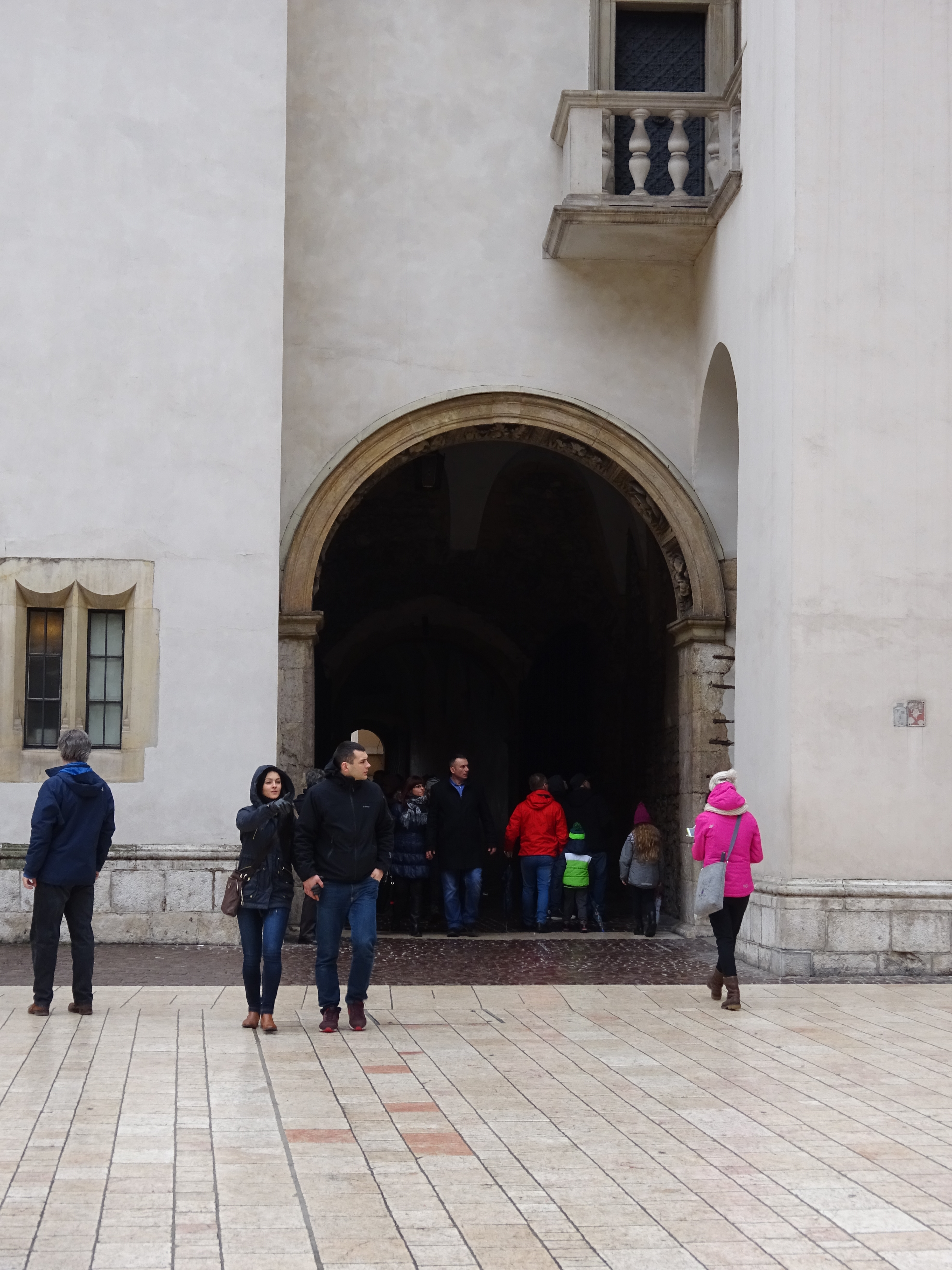 Brama Bartolommeo Berrecciego na Wawelu. Widok od strony Dziedzińca Arkadowego na Zamku. 2016